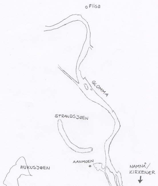 En enkel skisse over hvor gården Aanmoen/Ånmoen ligger i forhold til Flisa.